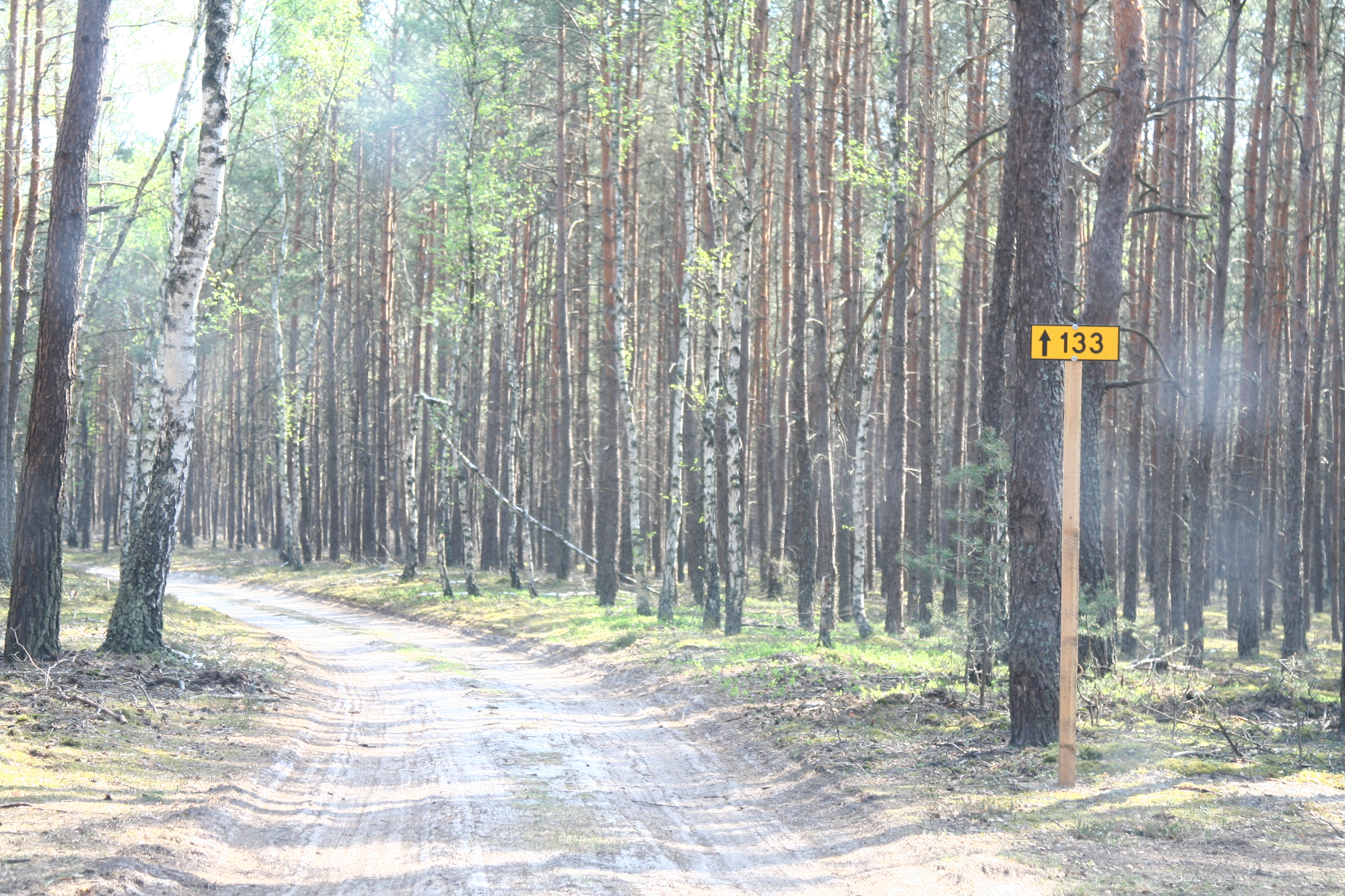 Droga nr 133